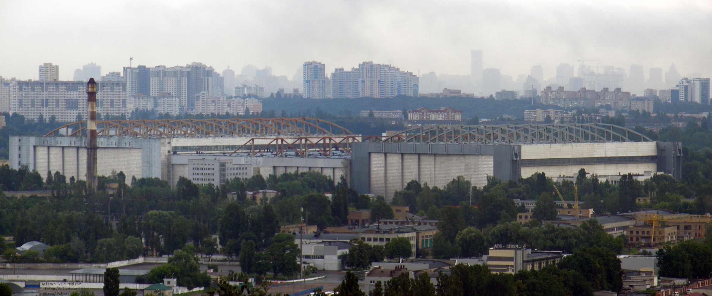 цехи завода имени Антонова